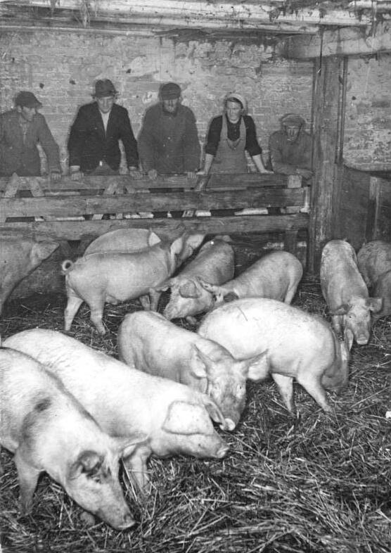 Zentralbild-Klein Kno-Ho. 10.11.1952 In der Produktionsgenossenschaft Altenpleen, Kreis Stralsund, Bezirk Rostock. In Altenpleen entstand am 27. Juli 52 durch die Initiative des Neubauern und Volkskammerabgeordneten Jendraß eine Produktionsgenossenschaft, die durch ihre von Anfang an geleistete Arbeit bald über die Grenzen de Bezirks hinaus bekannt wurde und heute anderen, noch schwächeren Genossenschaften beispielgebend vorangeht. Alle werktätigen Bauern von Altenpleen gehören der Genossenschaft an und arbeiten gut zusammen. So hat die Produktionsgenossenschaft Arbeitsbrigaden und kleine Arbeitsgruppen für die gemeinsame Bearbeitung ihrer Felder aufgestellt. Darüber hinaus wird die Genossenschaft 1953 zur genossenschaftlichen Viehhaltung übergehen und will als erste Genossenschaft das Ablieferungssoll in tierischen Produkten 100% erfüllen. Die Mitglieder der Genossenschaft stehen mit der Produktions-Genossenschaft Trinkwillershagen-Kr. Hibnitz-Damgarten im sozialistischen Wettbewerb um die besten Leistungen in der Genossenschaftsarbeit. UBz, 41 Schweine zählt jetzt schon die genossenschaftseigene Schweinemästerei, deren Bestand auf 60 Schweine erhöht werden soll. Bald wird sich die Genossenschaft einen neuen, grösseren Schweinestall errichten.